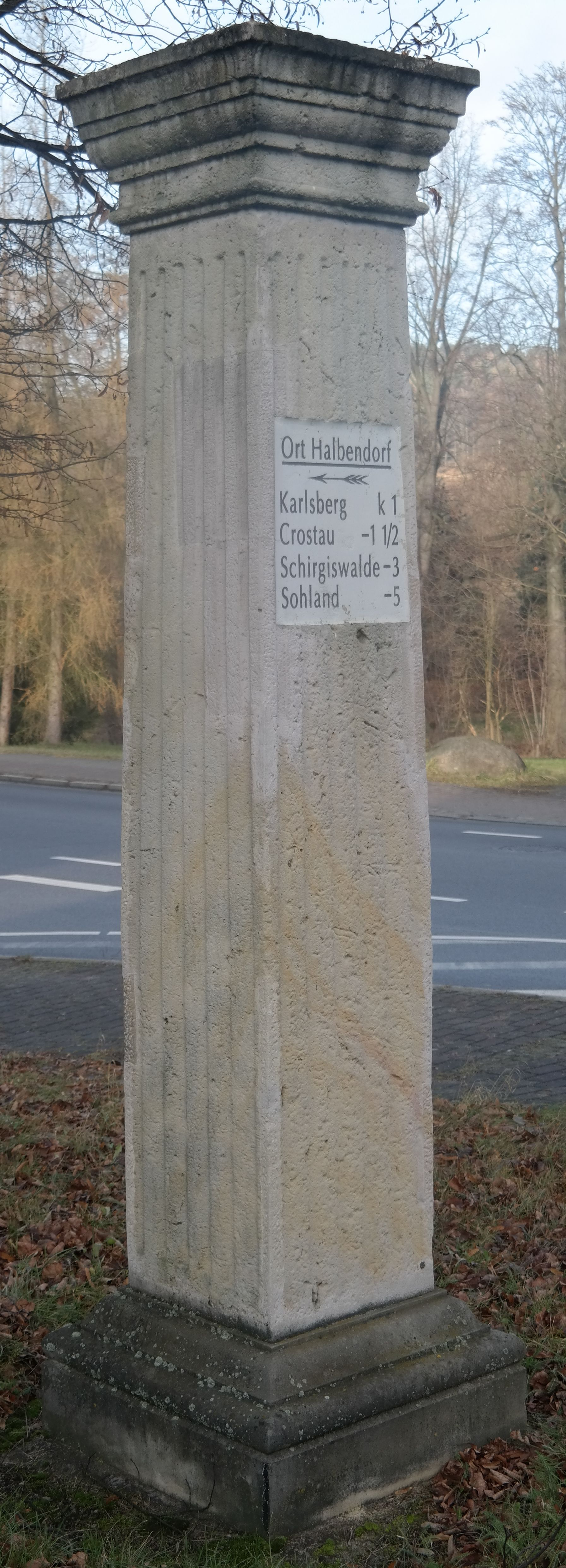 Postsäule in Halbendorf